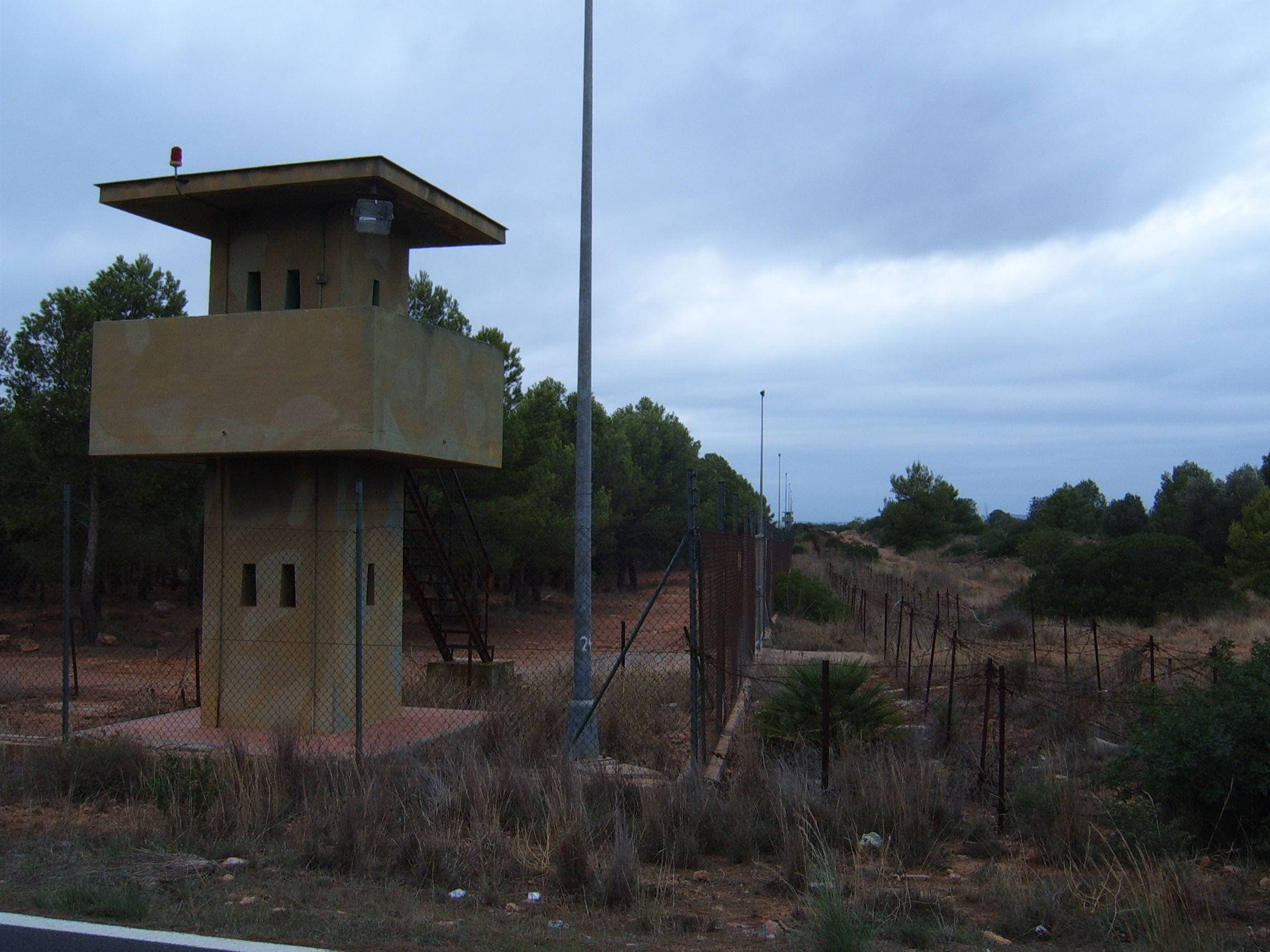 Cercado norte de separación entre helipuerto y campo de entrenamiento.